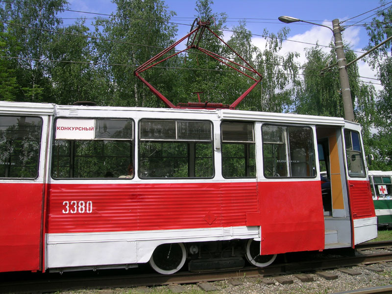 Трамвайный вагон 71-605 (КТМ-5). Пантограф, передняя дверь и тележка.